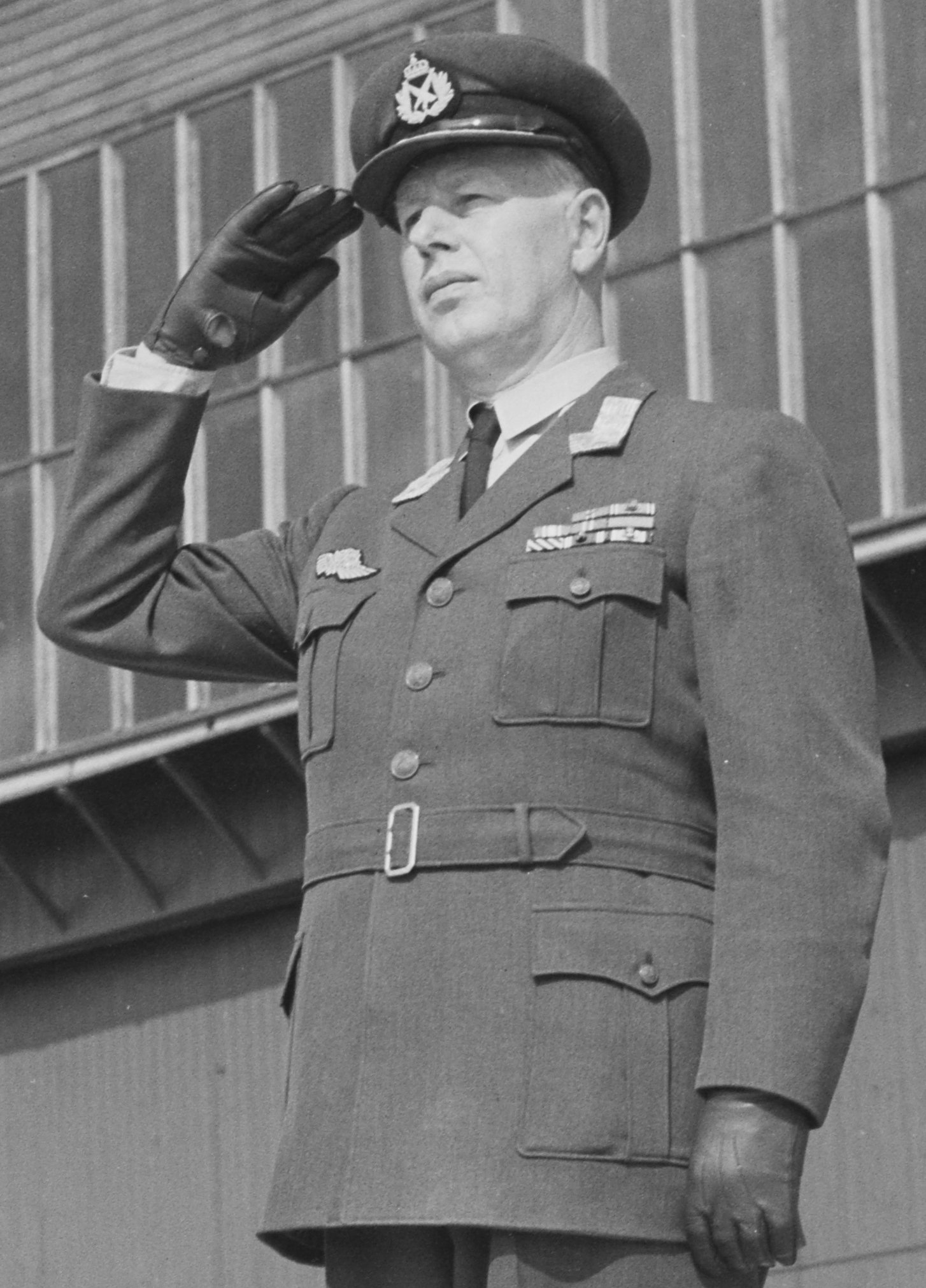 Bildet er hentet fra Arkivverket. Teknisk skole, Kjevik, 10-års jubileum. NÅ nr. 39,1955 Arkivinstitusjon : Riksarkivet Arkivnavn : Billedbladet NÅ Sted : Norge, Vest-Agder, Kristiansand, Kjevik Emneord: forsvaret, militære, oppstilling Avbildet